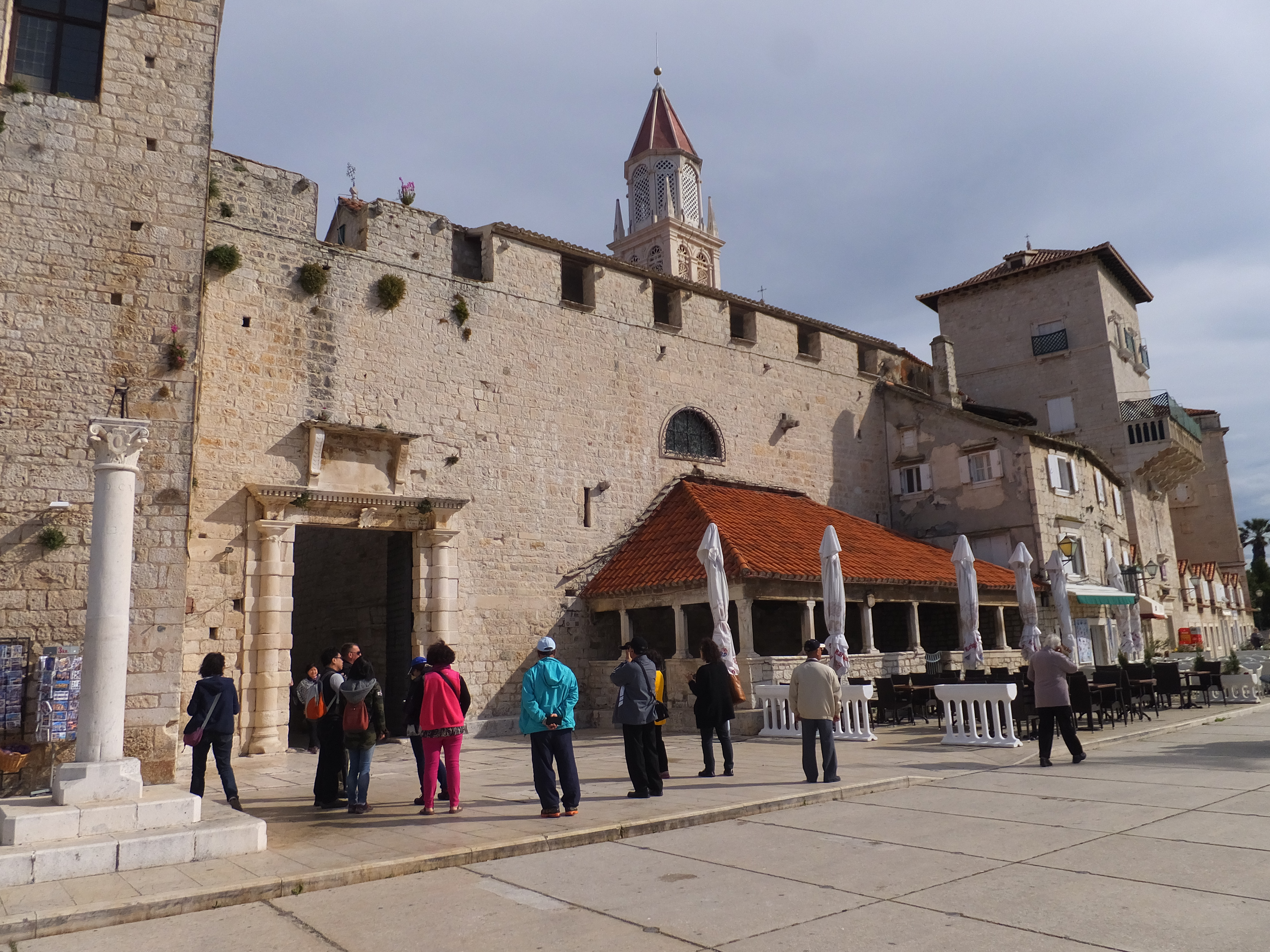 Kisciol sw. Mikolaja